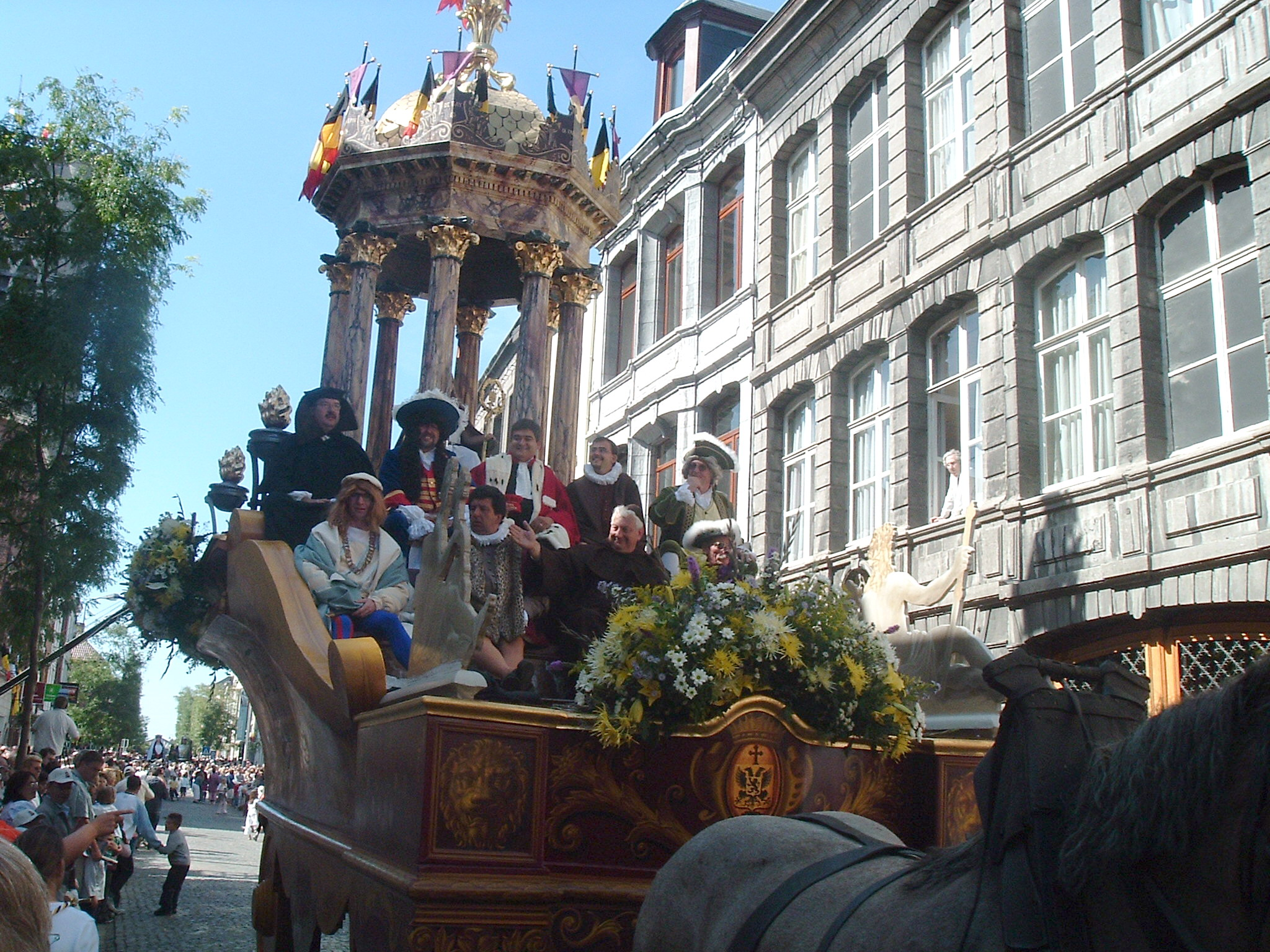 Le Char de la Ville d'Ath. Photo personnelle. Ducasse d'Ath 2004.Libre de droits.